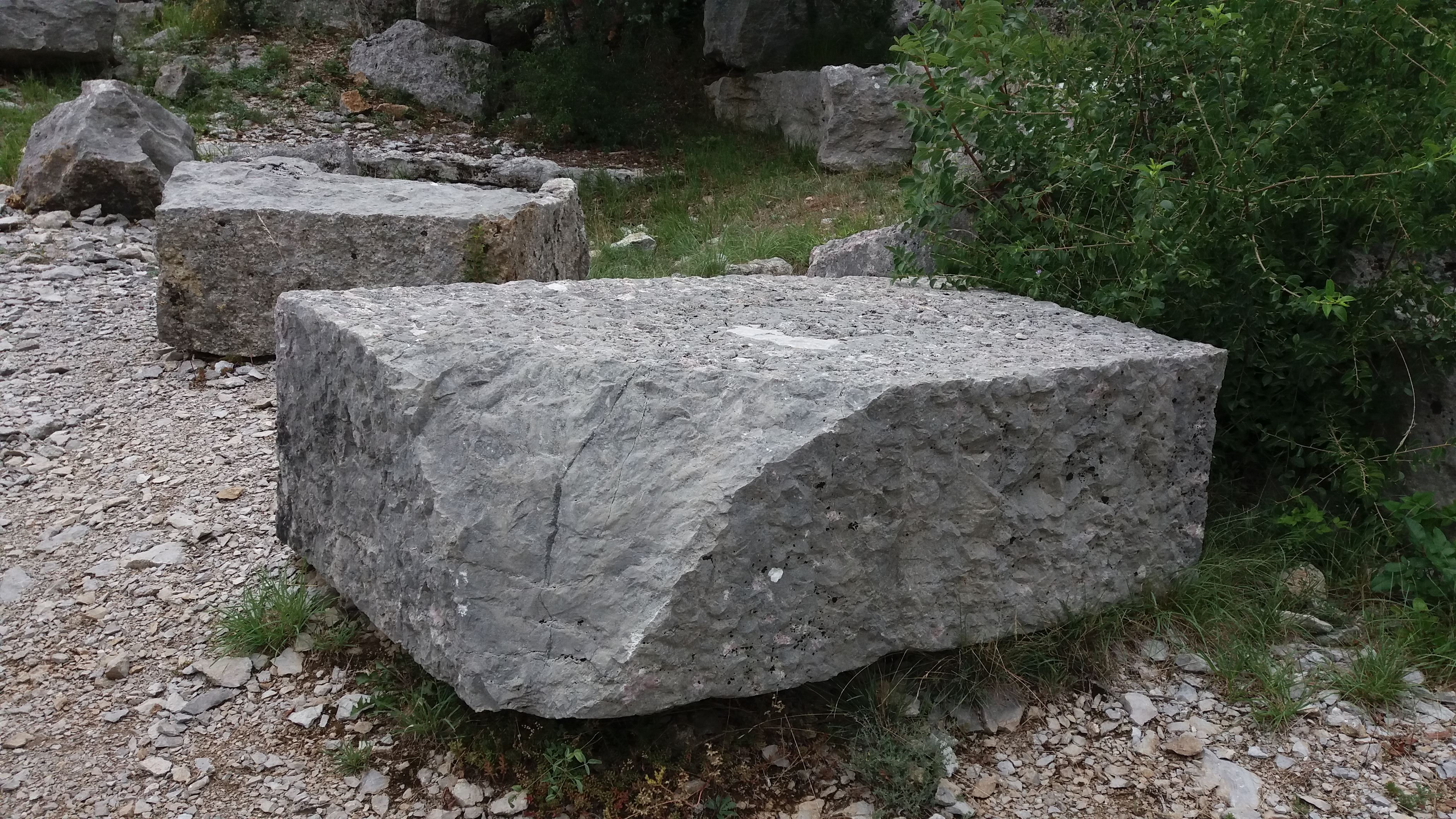 Ancienne carrière de pierre bleue à Vogüé (carrières Giraud).